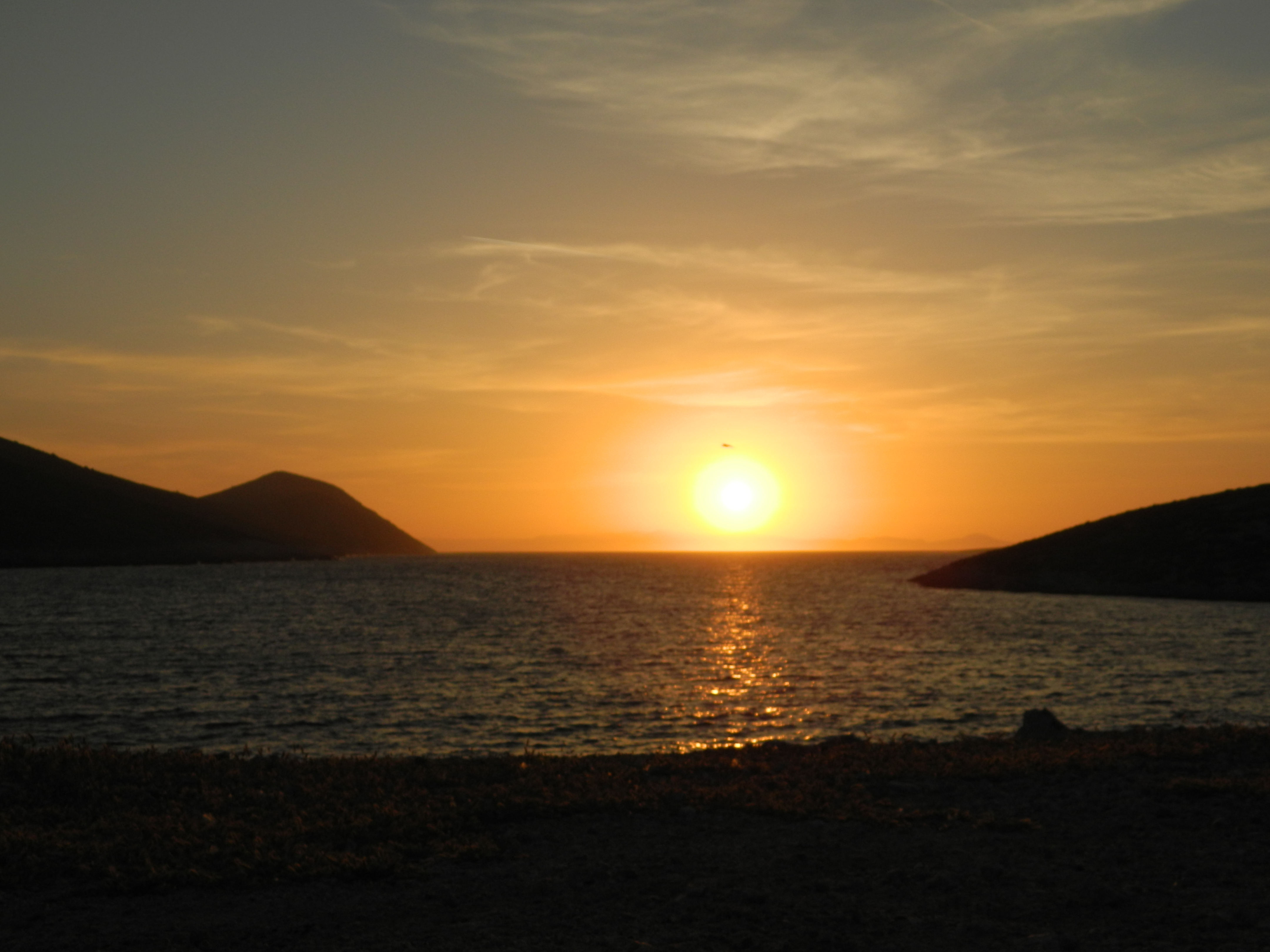 Δύση ηλίου